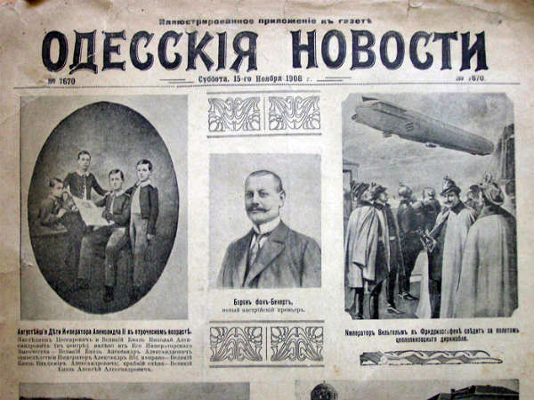 Одесские новости (1908)